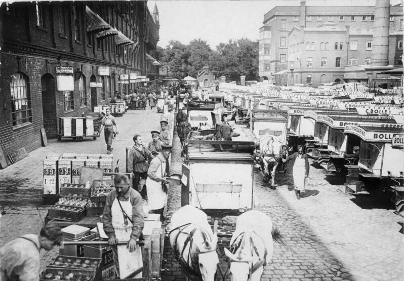 Berlin 1925, 12407 - 25